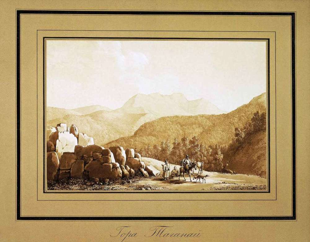 Вид горы Таганай. На рисунке изображены башкиры на соколиной охоте